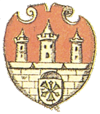 Johann Siebmacher: Neues Wappenbuch eingescannt aus: Horst Appuhn (Hrsg.), Johann Siebmachers Wappenbuch. Die bibliophilen Taschenbücher 538, 2. verb. Aufl , Dortmund 1989 Städte Blatt 221